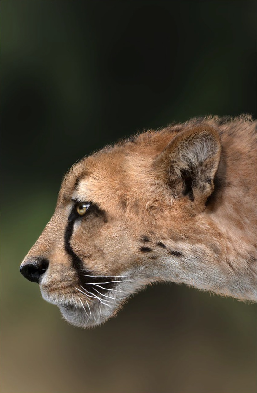 Head appearance of Acinonyx pardinensis. The reconstruction is based on the complete skull from Pantalla and is updated with the information on the craniodental anatomy of A. pardinensis achieved from the Monte Argentario specimen. Artwork by D. A. Iurino.